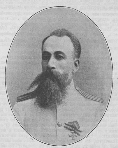 Description=Russian Admiral Nikolai Karlovich Reitsenstein